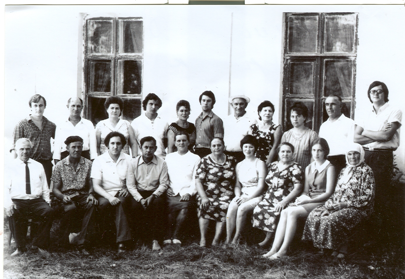 Фотография Покровского и первый состав ансамбля в 1974 году. Фото во время экспедиции на Дон.